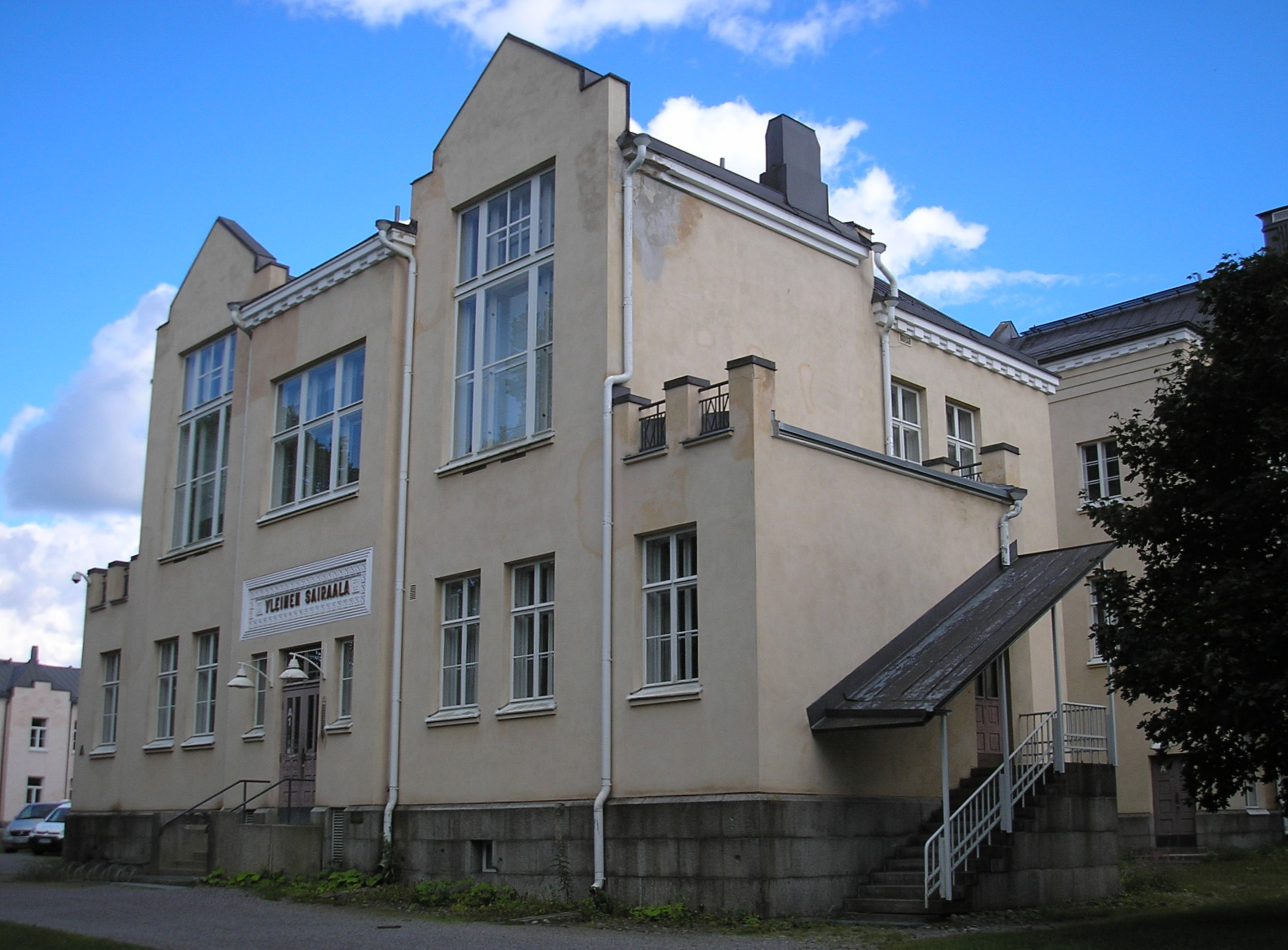 Entisen Tampereen yleisen sairaalan päärakennus Kalevankankaalla.